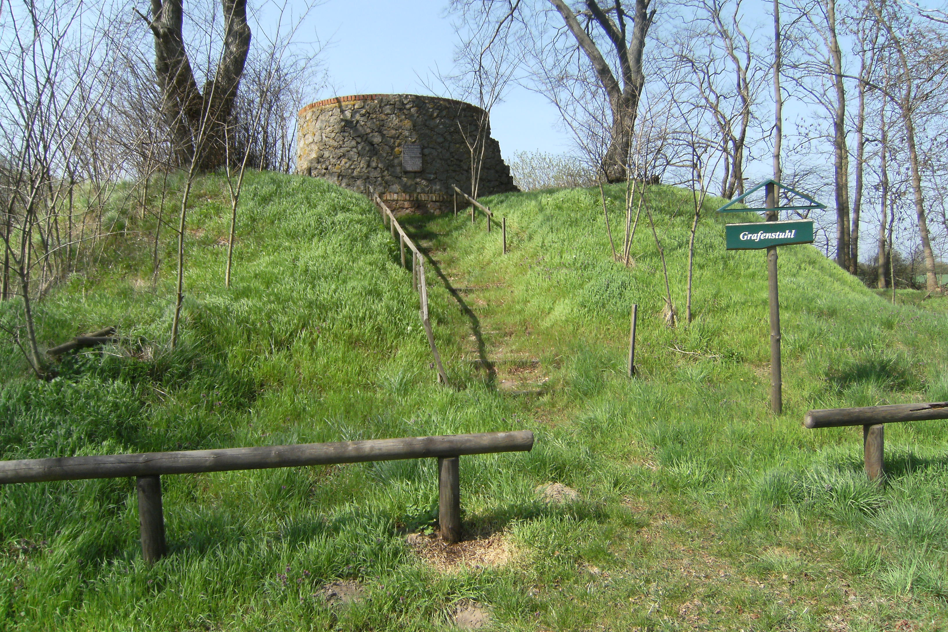 Turmhügel "Grafenstuhl" Zinzow